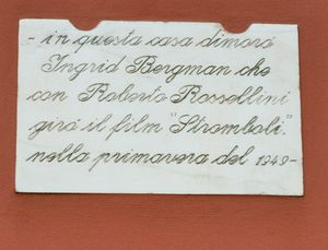 Gedenktafel an die Dreharbeiten von 1949 am Haus von Bergman und Rosselini